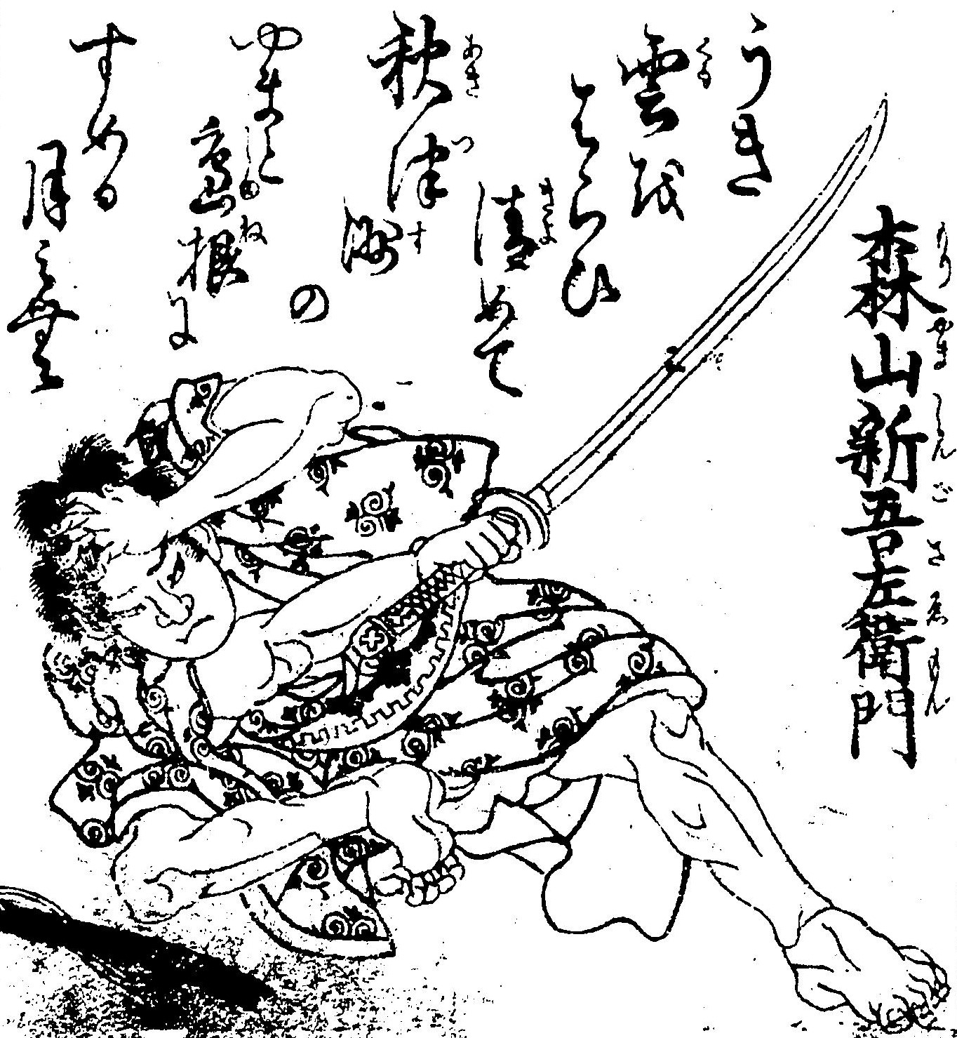 森山新五左衛門の肖像。